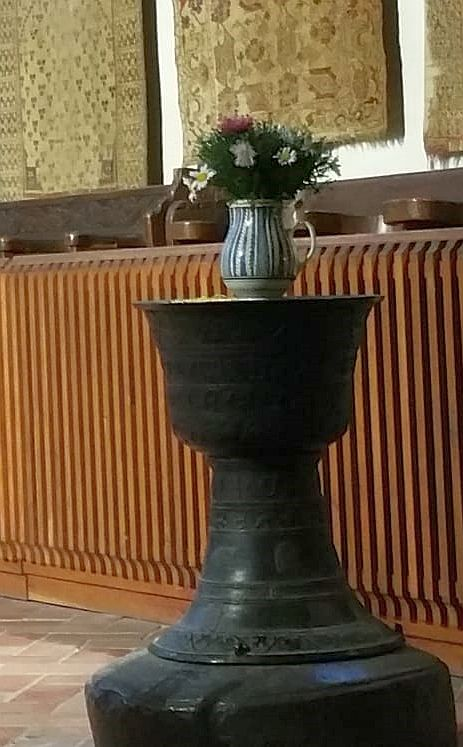 Cea mai veche cristelniță de bronz din România (1370), de la Biserica Sfânta Margareta din Mediaș